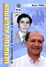 Capa do livro de Geraldo Alckmin escrito por Acir Filló, design de Pedro Gomes dos Santos